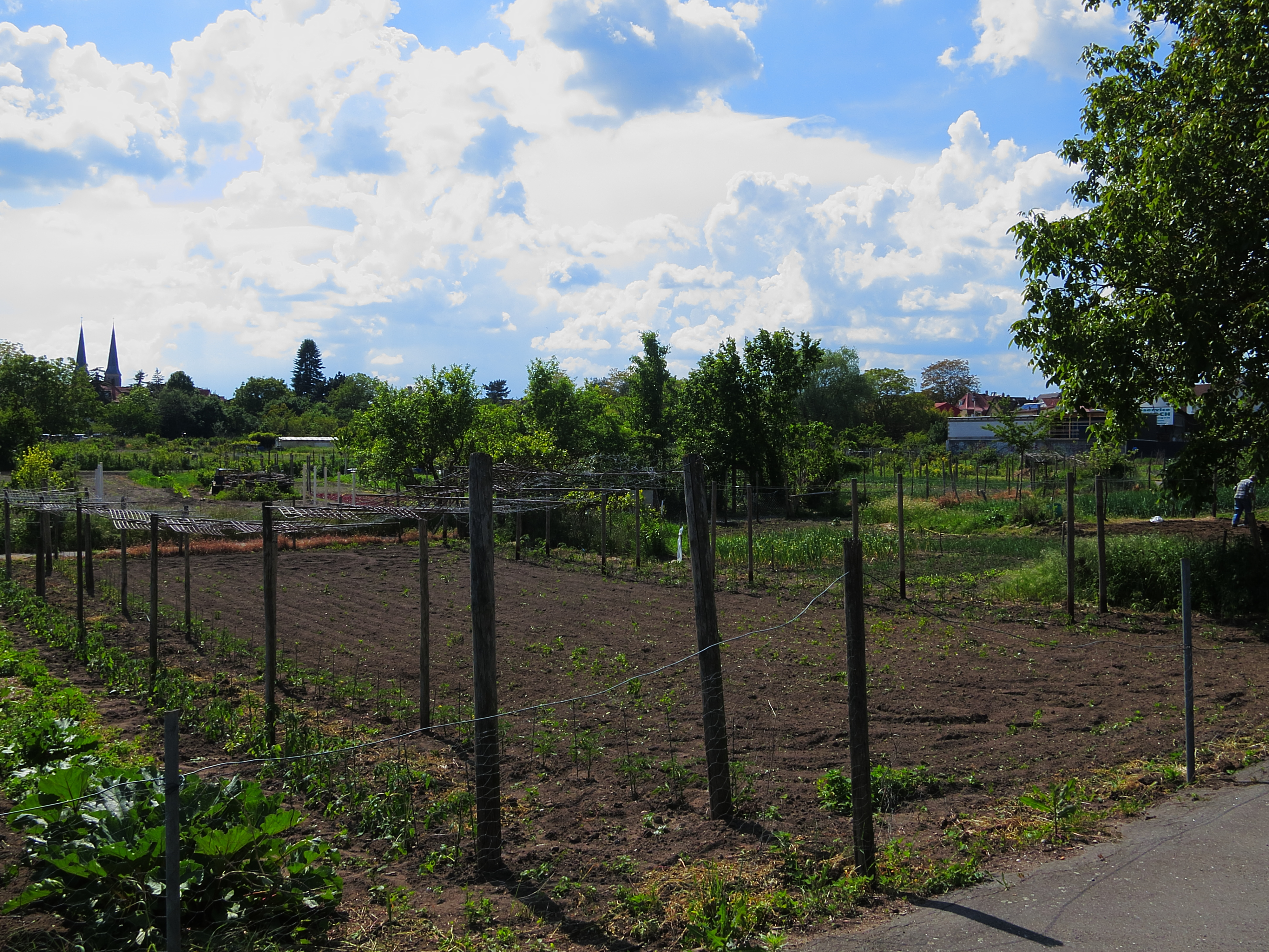 Blick von Osten auf das LSG Ölwiese im Mainzer Stadtteil Gonsenheim